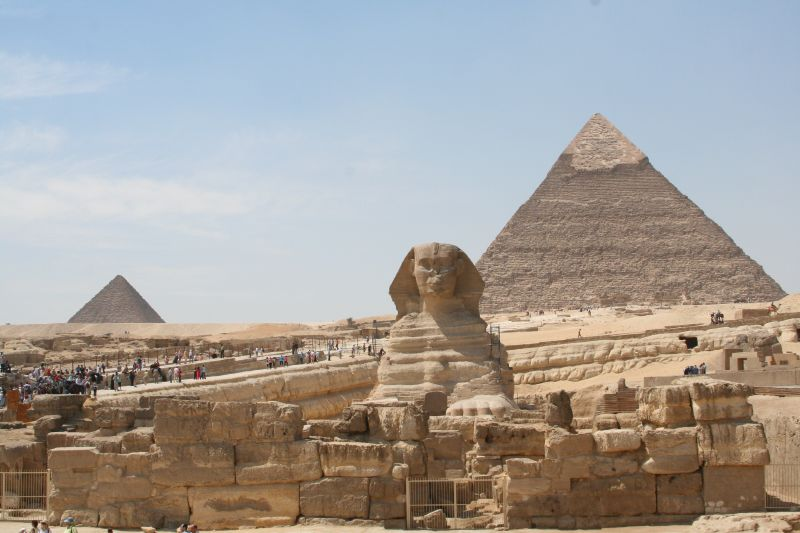 Fotografía esfinge y pirámides.